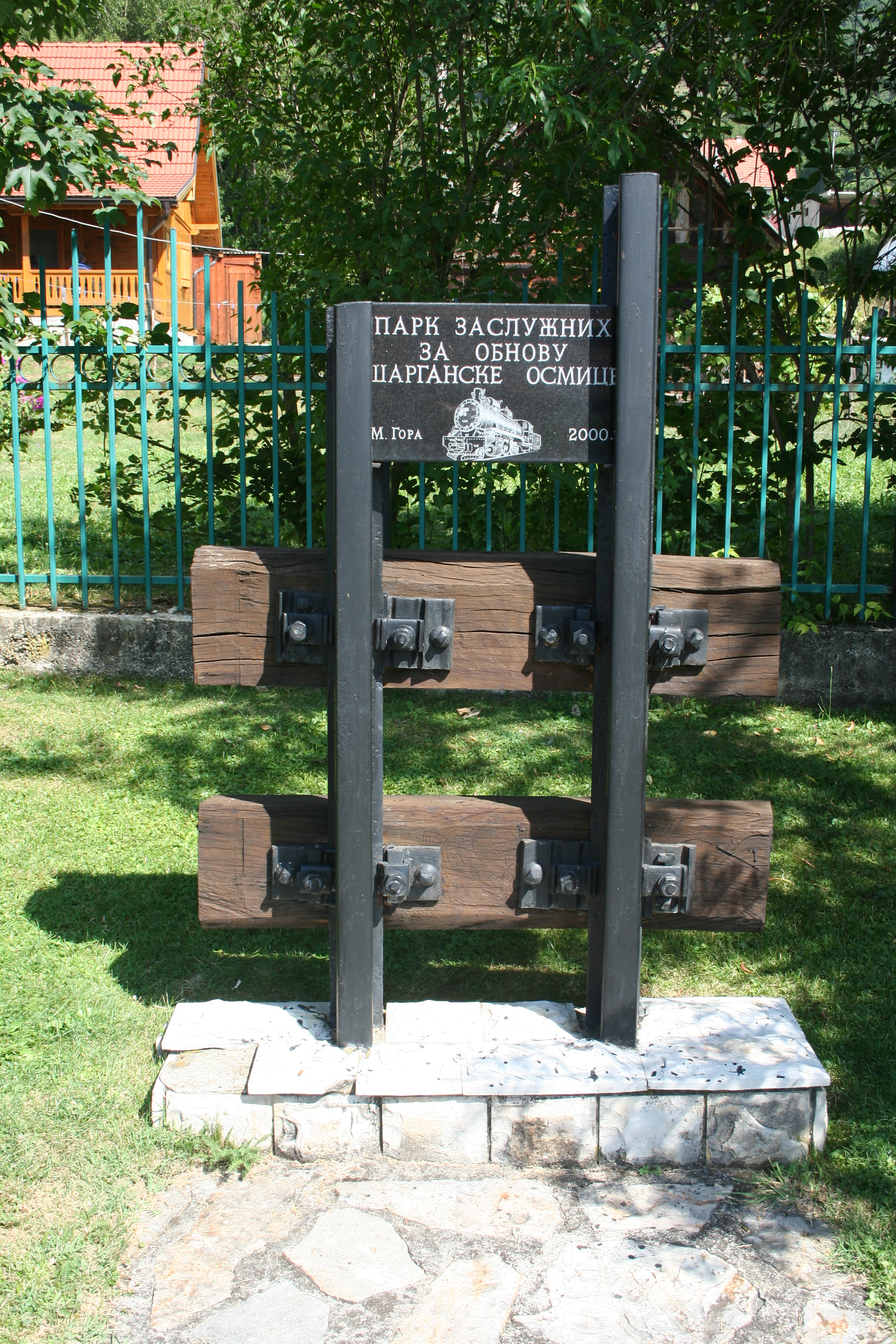 Šarganska osmica, Mokra Gora